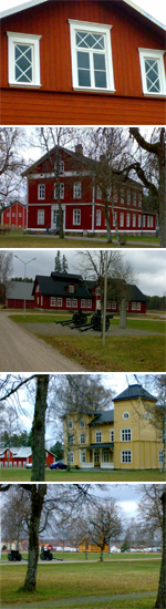 Skillingarydslägret. Redan under 1600-talet övades det på Slätten i Skillingaryd. 1677–1914 övade och mönstrade Jönköpings regemente I 12 i Skillingaryd. De flesta av de unika byggnaderna från regementets tid i Skillingaryd finns bevarade. Sedan ett antal år tillbaka är dessa byggnader tillsammans med marken K-märkta - kulutrminnesförklarade. Det innebär att de är säkerställda för framtiden.